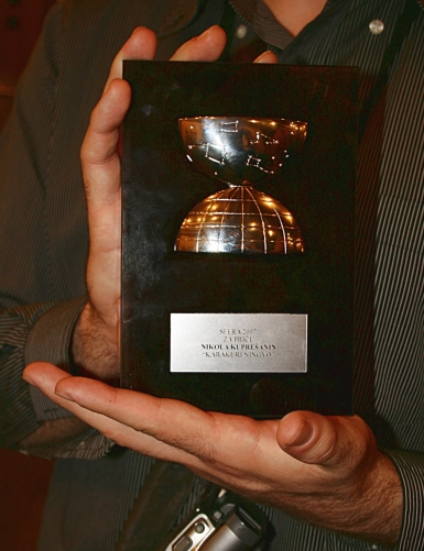 SFERA Nikole Kuprešanina na SFeraKonu u Zagrebu